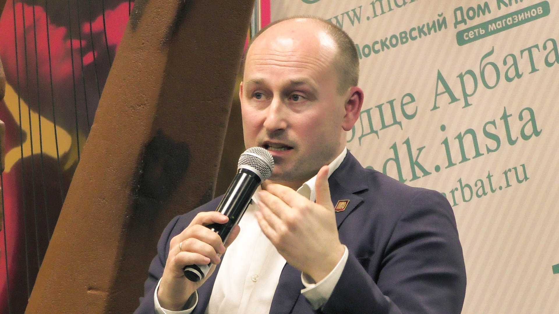 02.03.2017. Николай Стариков в Московском Доме Книги.